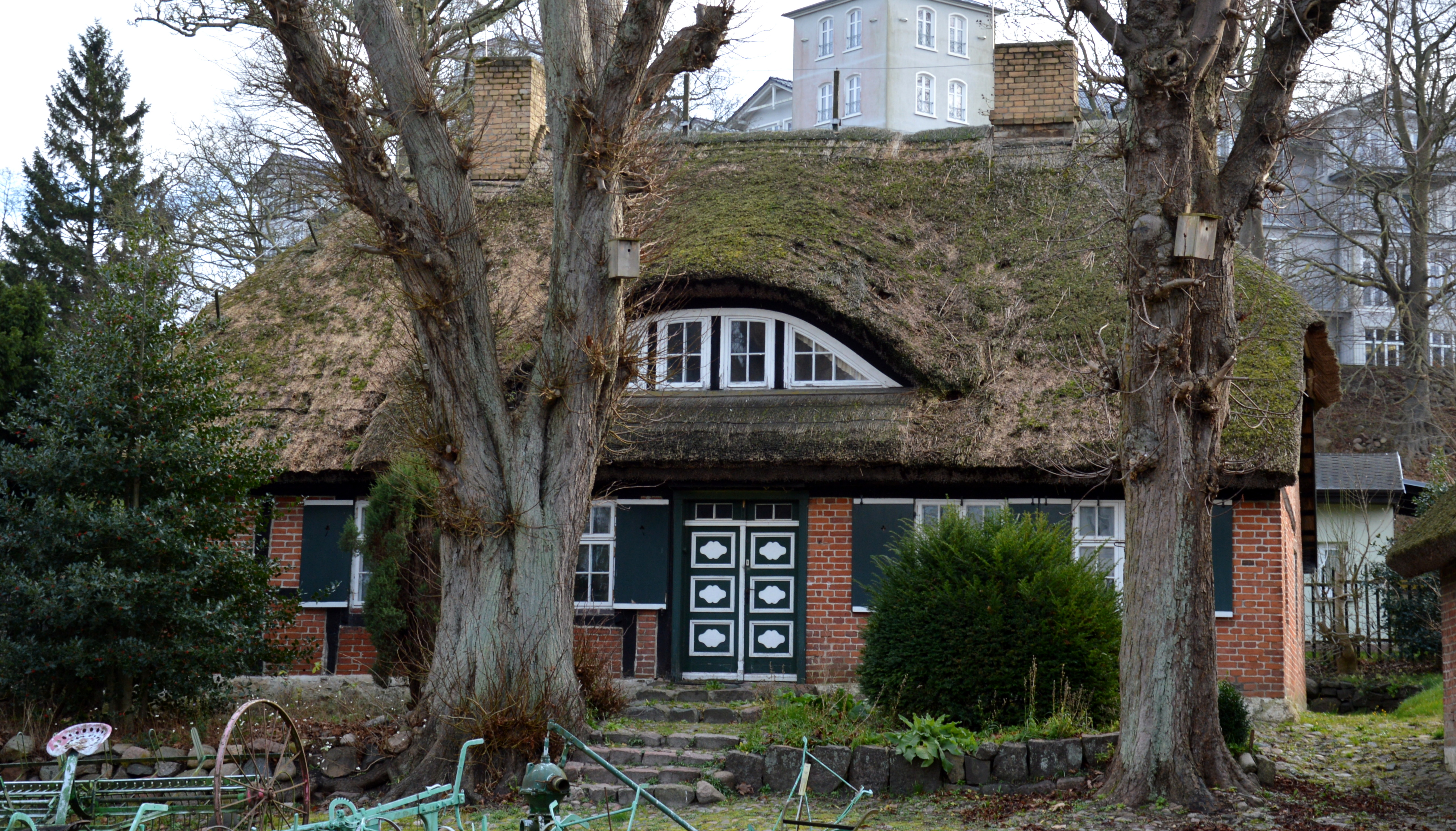 Museumshof Mönchsgut 2017